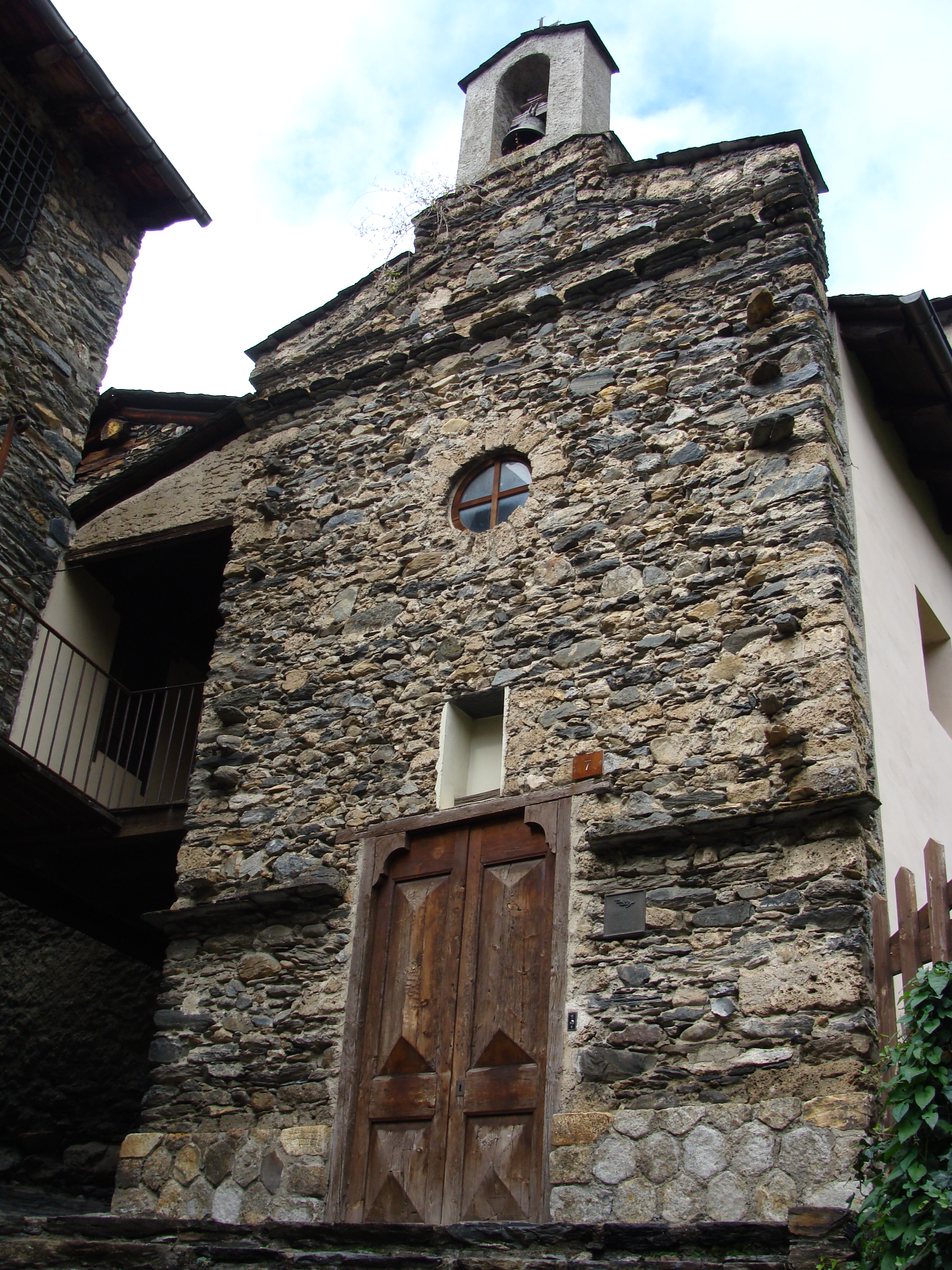 Capella de casa Rossell, Ordino, Principat d'Andorra